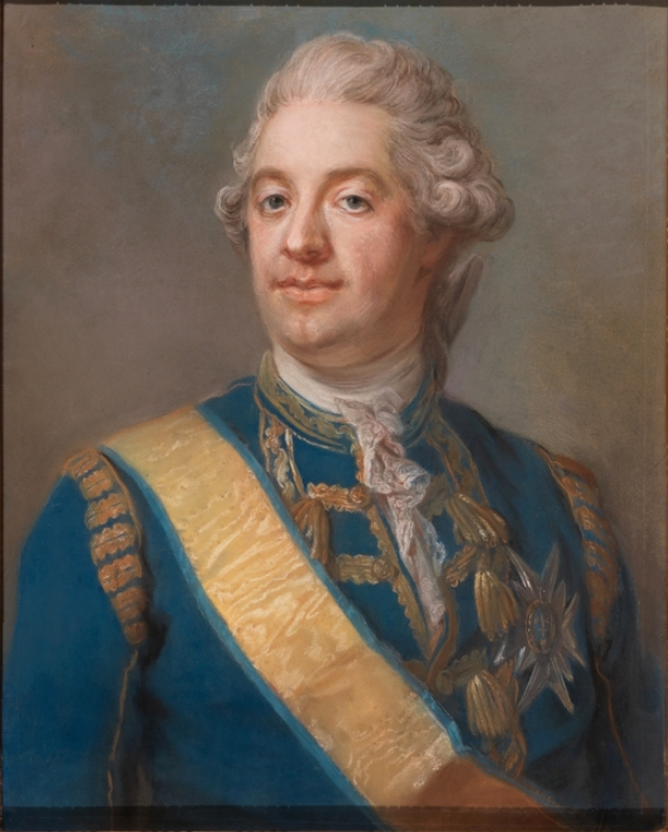 Greve Claes Julius Ekeblad (1742-1808), generalmajor, landshövding och överstekammarjunkare.